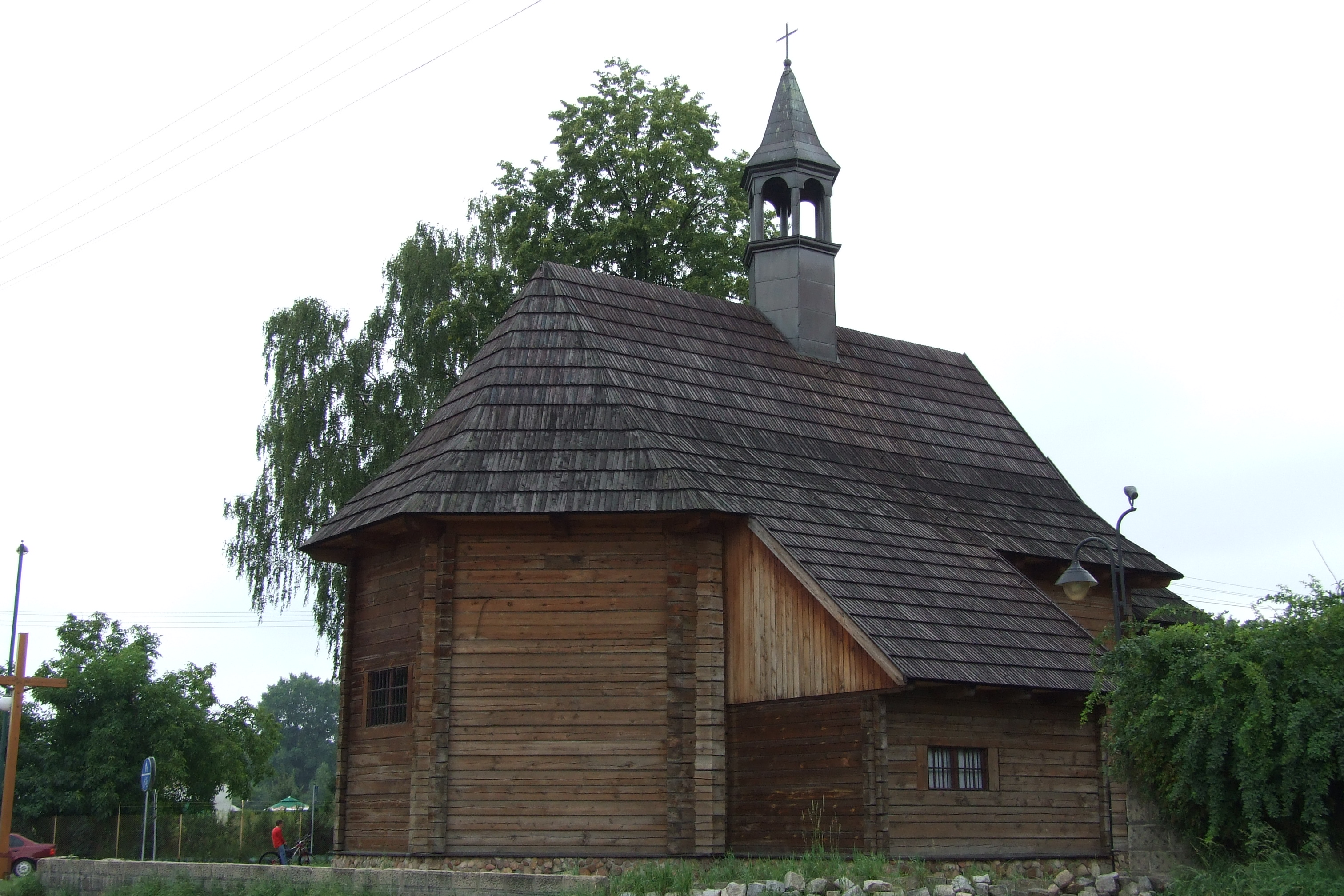 Kościół św. Anny w Lublińcu